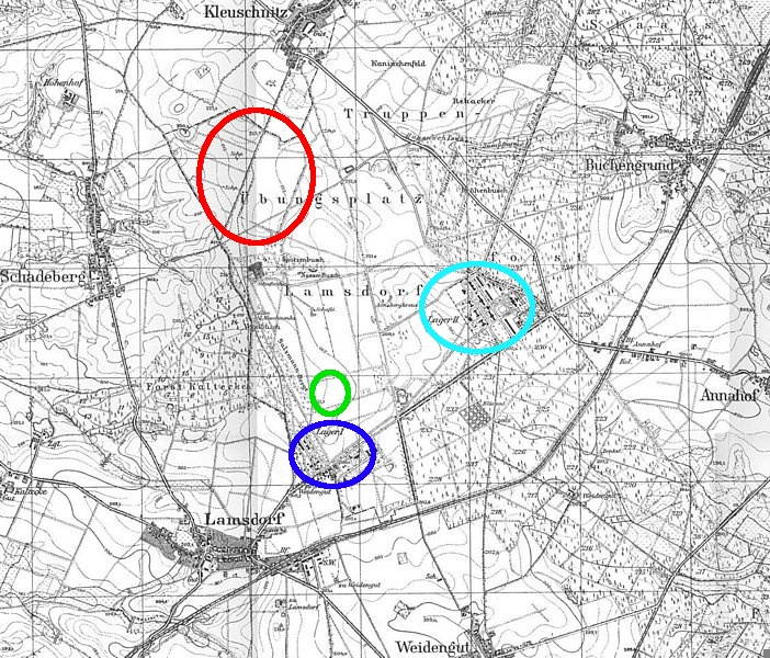 Uproszczony szkic położenia obozów jenieckich w pobliżu Łambinowic (Lamsdorf) k. Opola ciemnoniebieski - Lager I, obóz jeniecki z czasów wojny francusko-pruskiej jasnoniebieski - Lager II, obóz jeniecki z czasów I wojny światowej oraz Stalag VIIIB (Britenlager) z II wojny światowej czerwony - Stalag VIIIF (Russenlager) z czasów II wojny światowej zielony - obóz pracy z lat 1945-1946 nazwy miejscowości Lamsdorf = Łambinowice Schadeberg = Szadurczyce Kleuschnitz = Klucznik Buchengrund = Goszczowice Annahof = Sowin Weidengut = Wierzbie